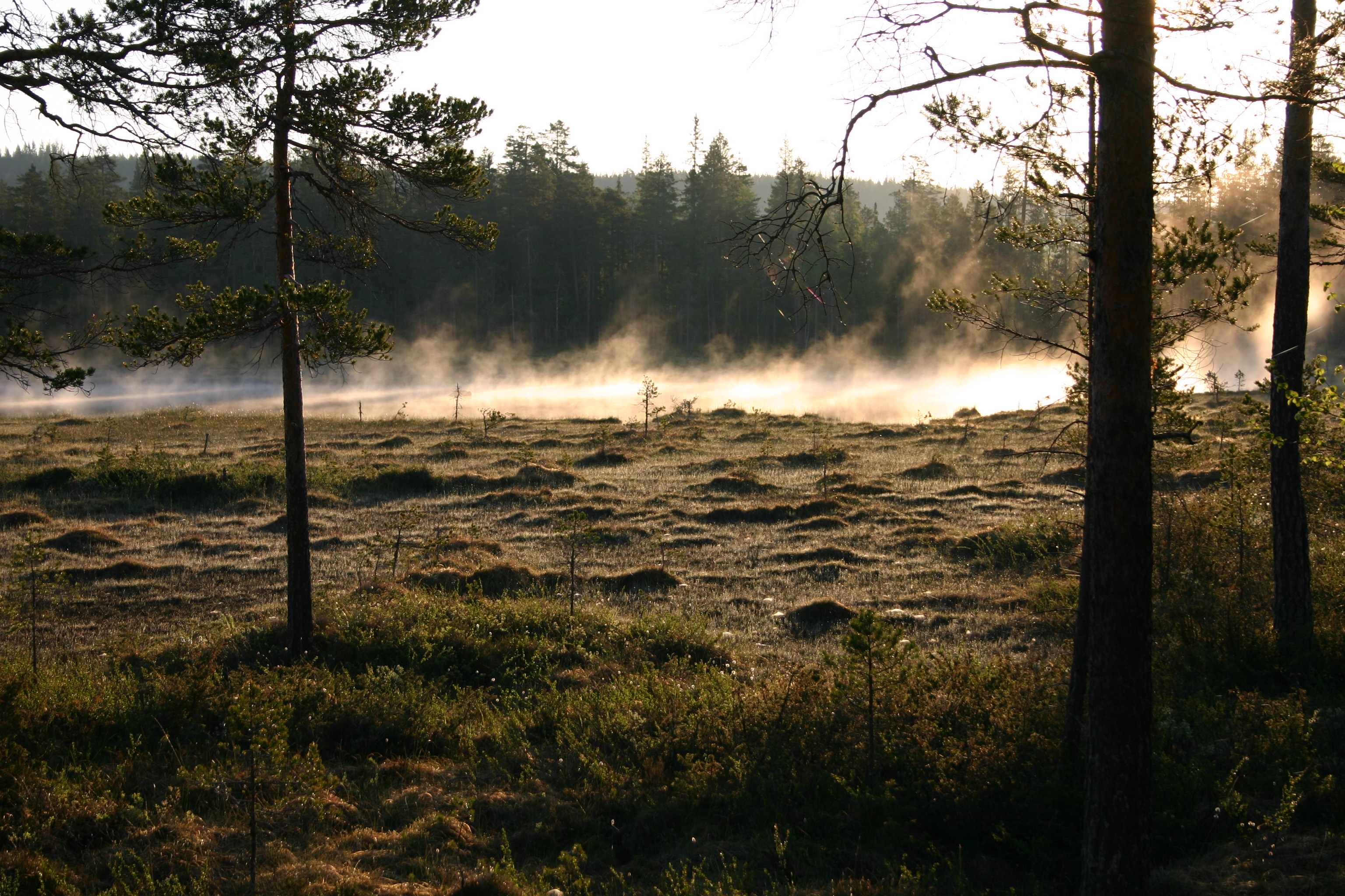 Brume sur le parc national de Hamra